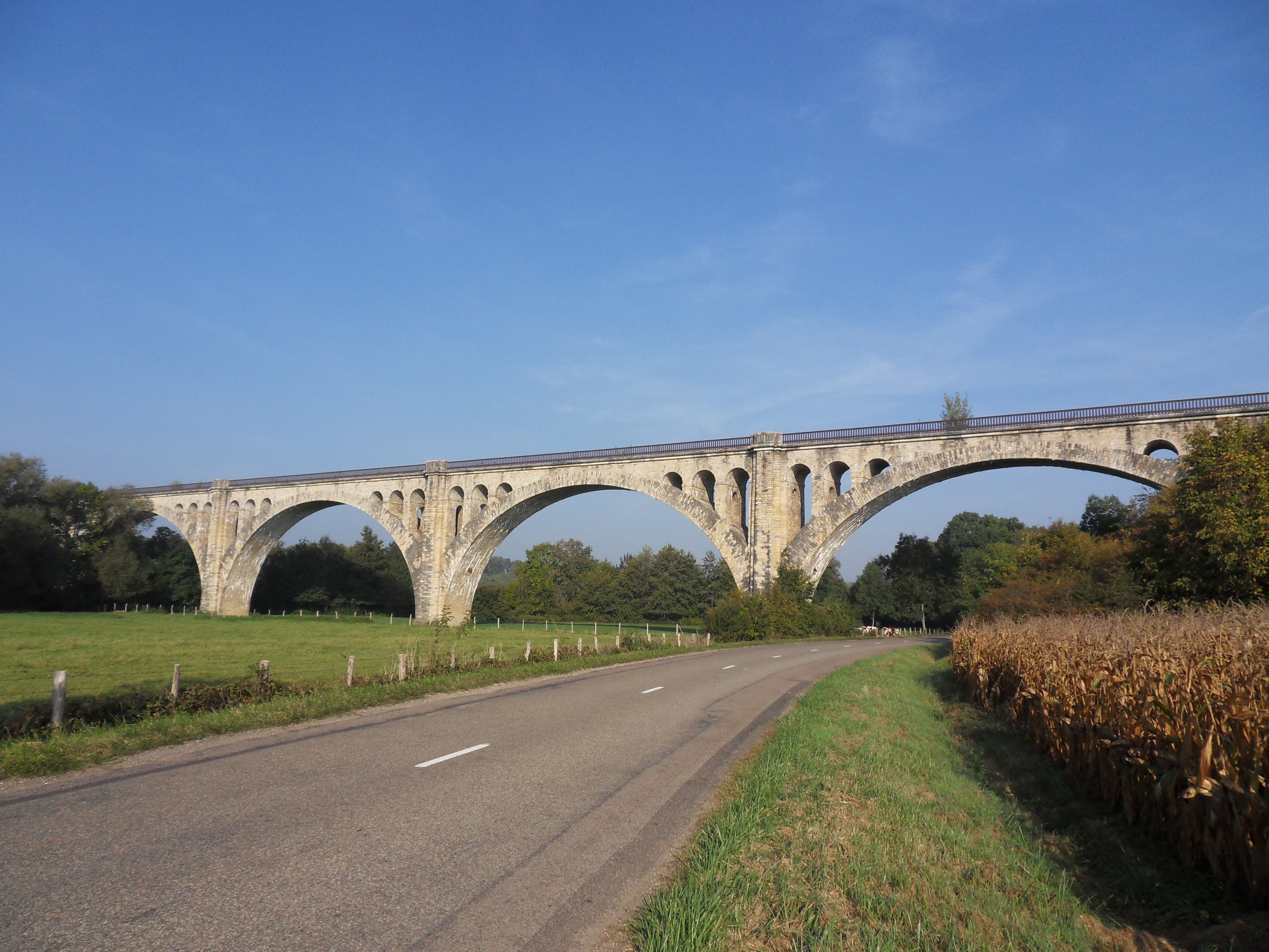 Oisilly, (Côte-d'Or) France. Le viaduc ferroviaire de la ligne désaffectée de Saint-Julien à Gray. longueur : 294 m., hauteur : 20 m. ; 7 arches